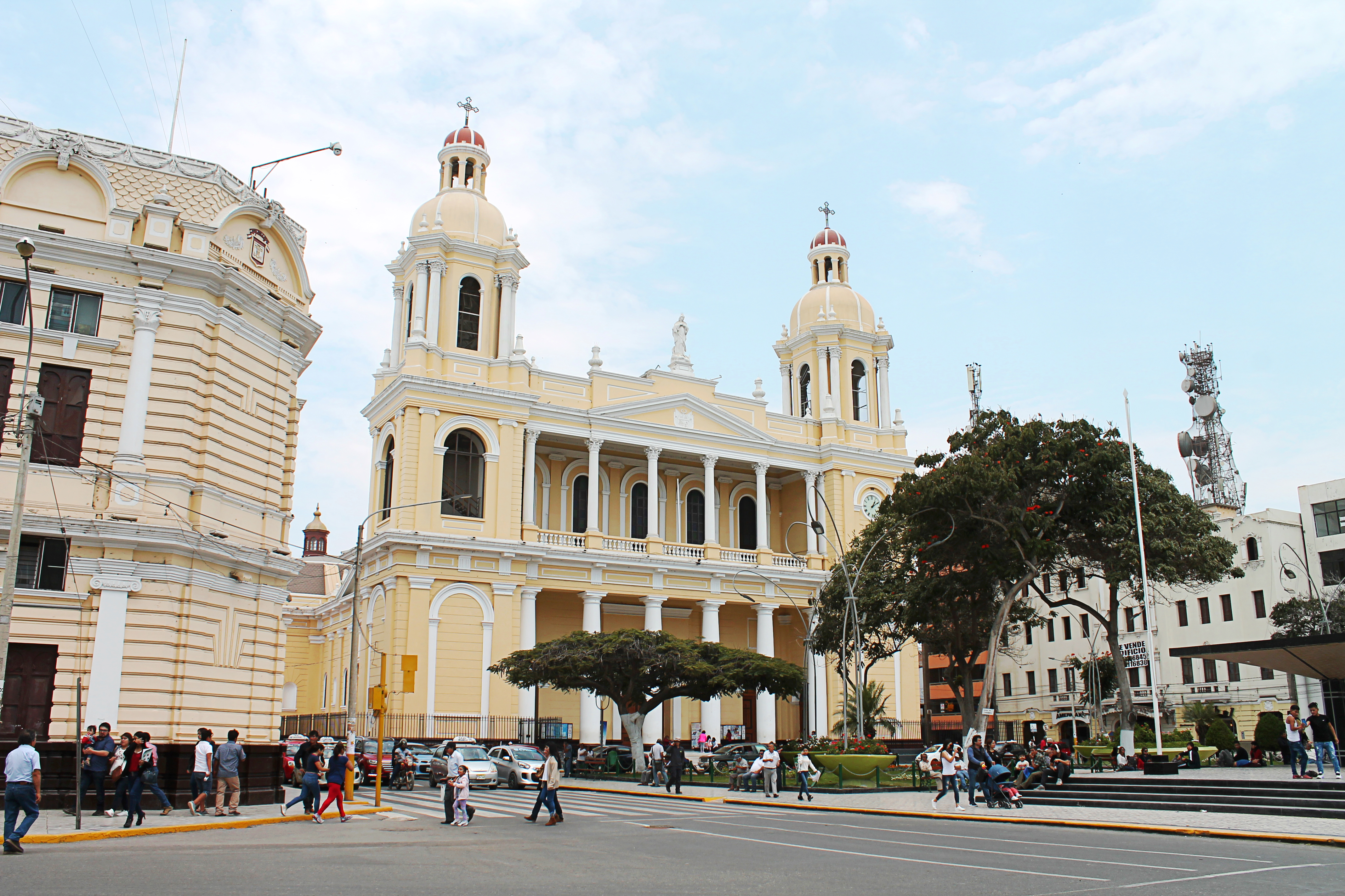 Construcción: 1869-1939 Estilo arquitectónico: Neoclásico Arquitecto: Gustave Eiffel Diócesis: Diócesis de Chiclayo